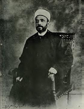 الأستاذ الشيخ أحمد طبارة، عضو وفد بيروت إلى المؤتمر، وصاحب جريدة الإصلاح اليومية في بيروت.